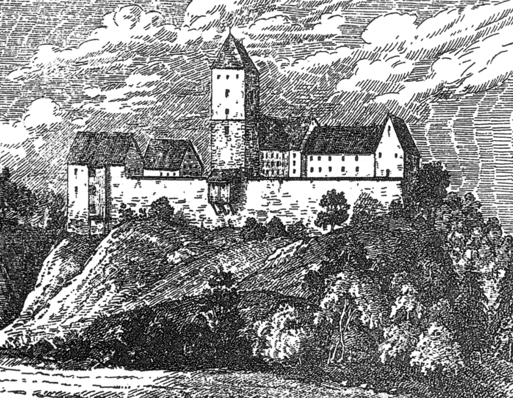 Südansicht von Burg Kemnat, Zeichnung aus dem Jahr 1804